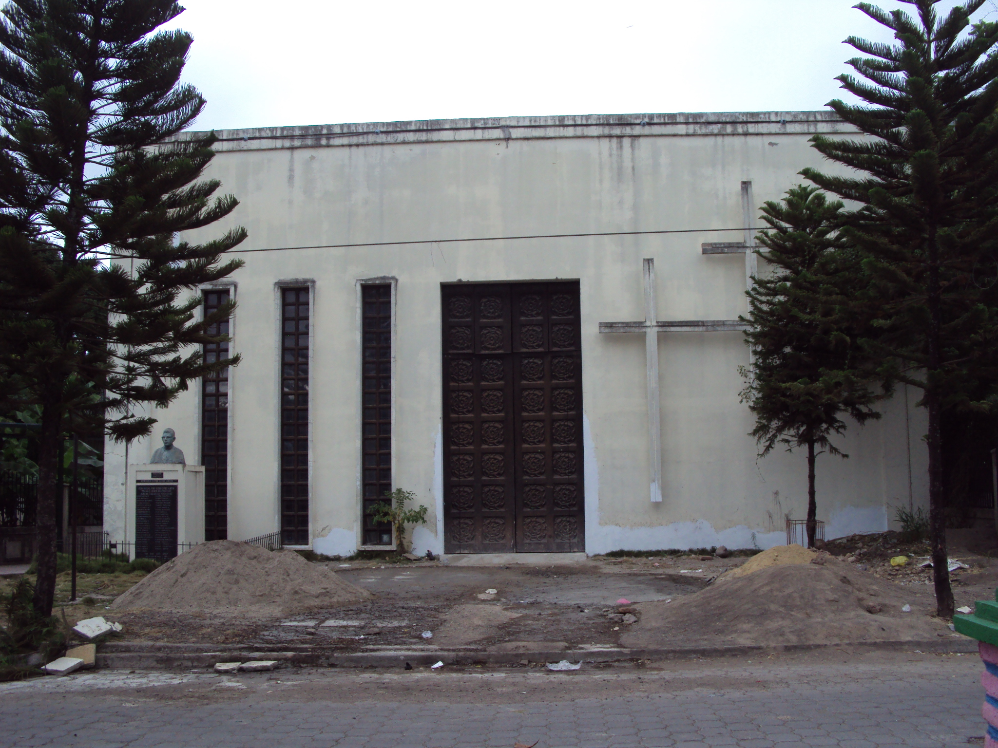 Iglesia Católica de La Trinidad Lástima que cuando fuí se miraba tan descuidada.